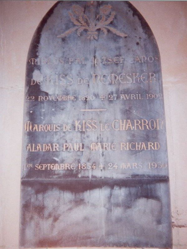 Nemeskéri Kiss Miklós 48-as honvéd ezredes, emigráns politikus sírköve a villecerfi (Franciaország) temető családi kriptájában Fekist saját felvétele (2001)